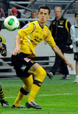 Haris Radetinac